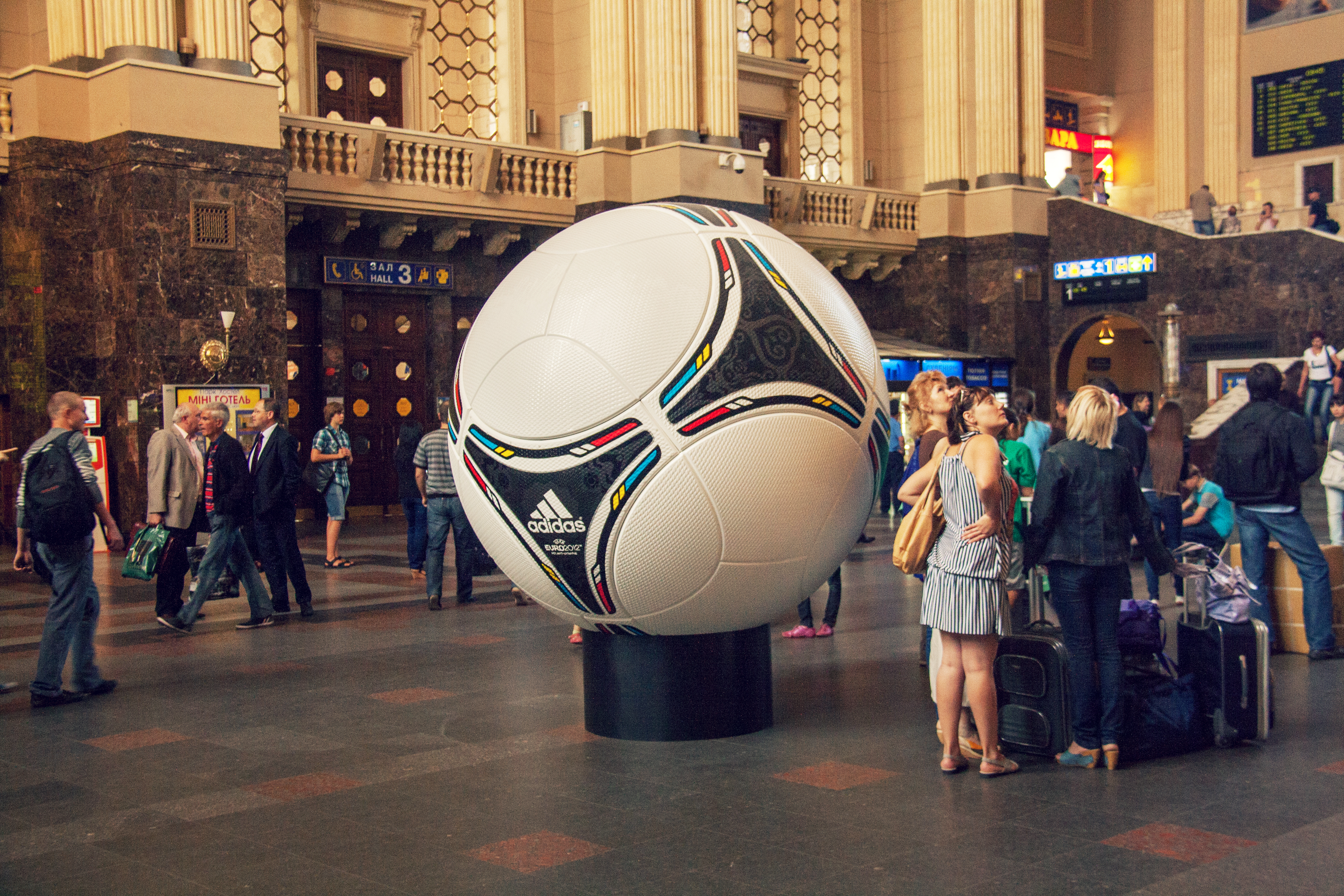 Kiev, Ucrania